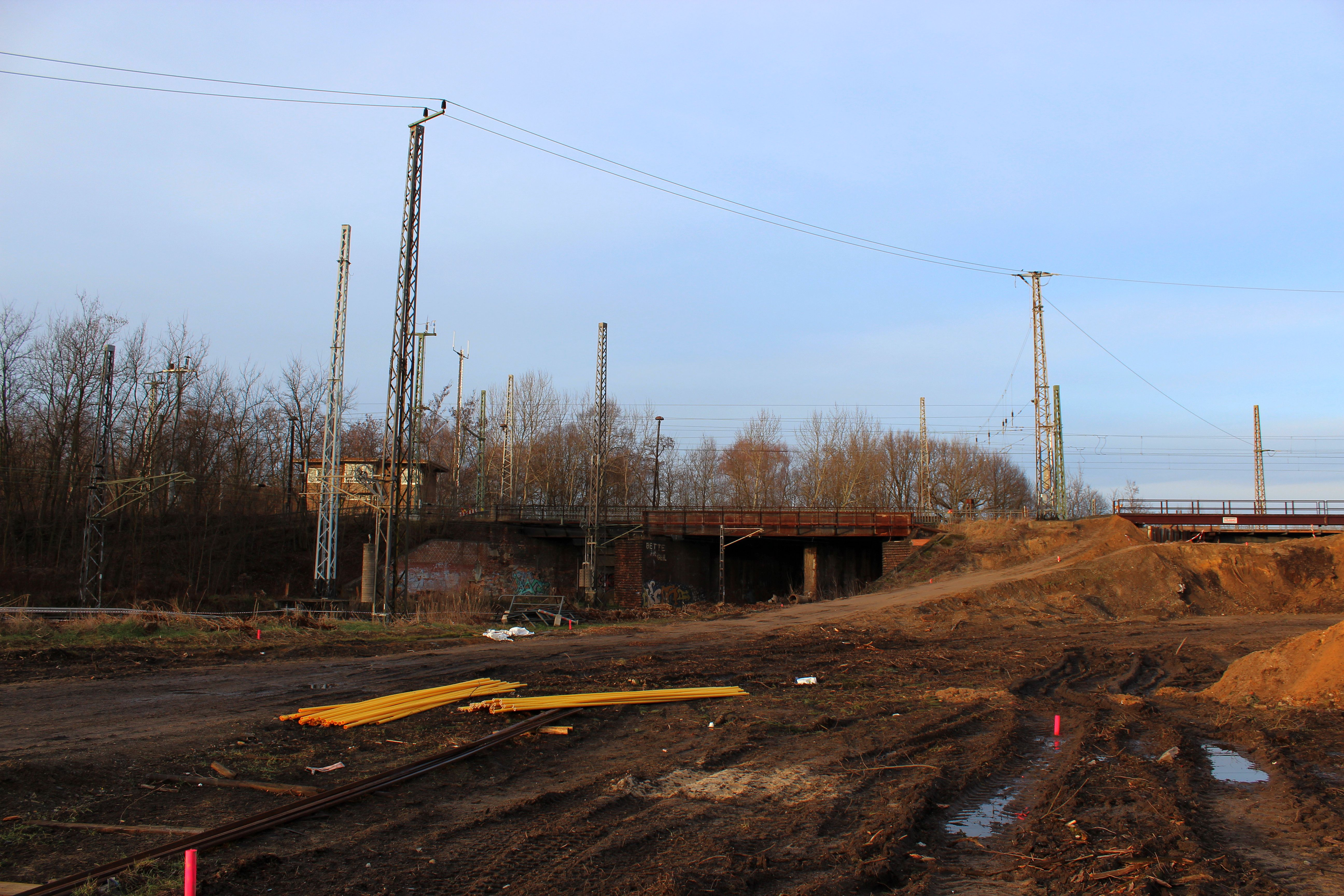 Bahnhof Elsterwerda-Biehla.